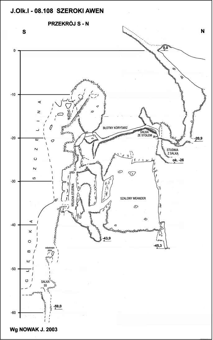 Szeroki Awen - plan